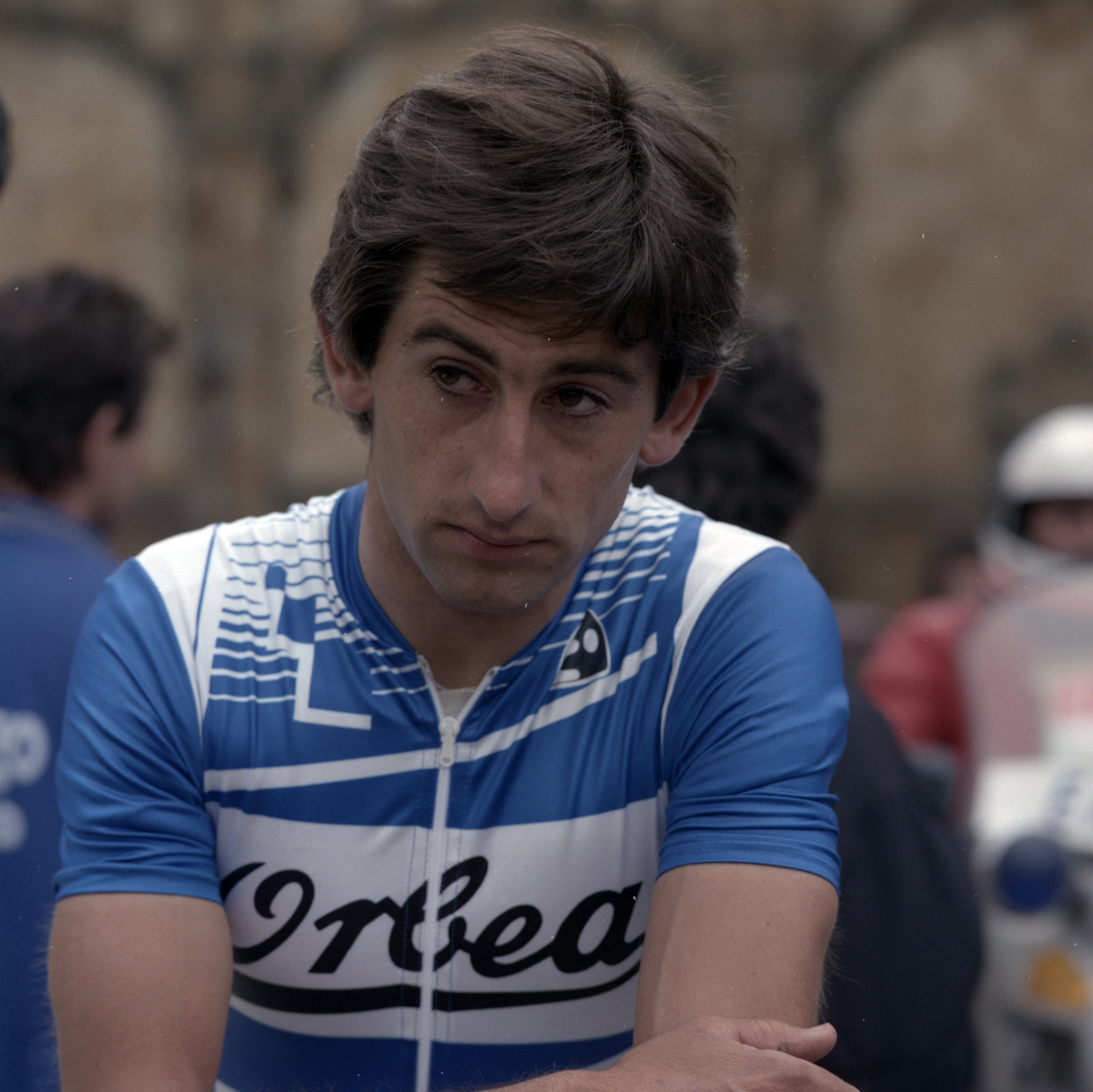 Marino Lejarreta Arrizabalaga euskal errepideko txirrindulari profesionala. 1987ko apirilaren 10a. - Marino Lejarreta Arrizabalaga basque professional road racing cyclist. 10 April, 1987.